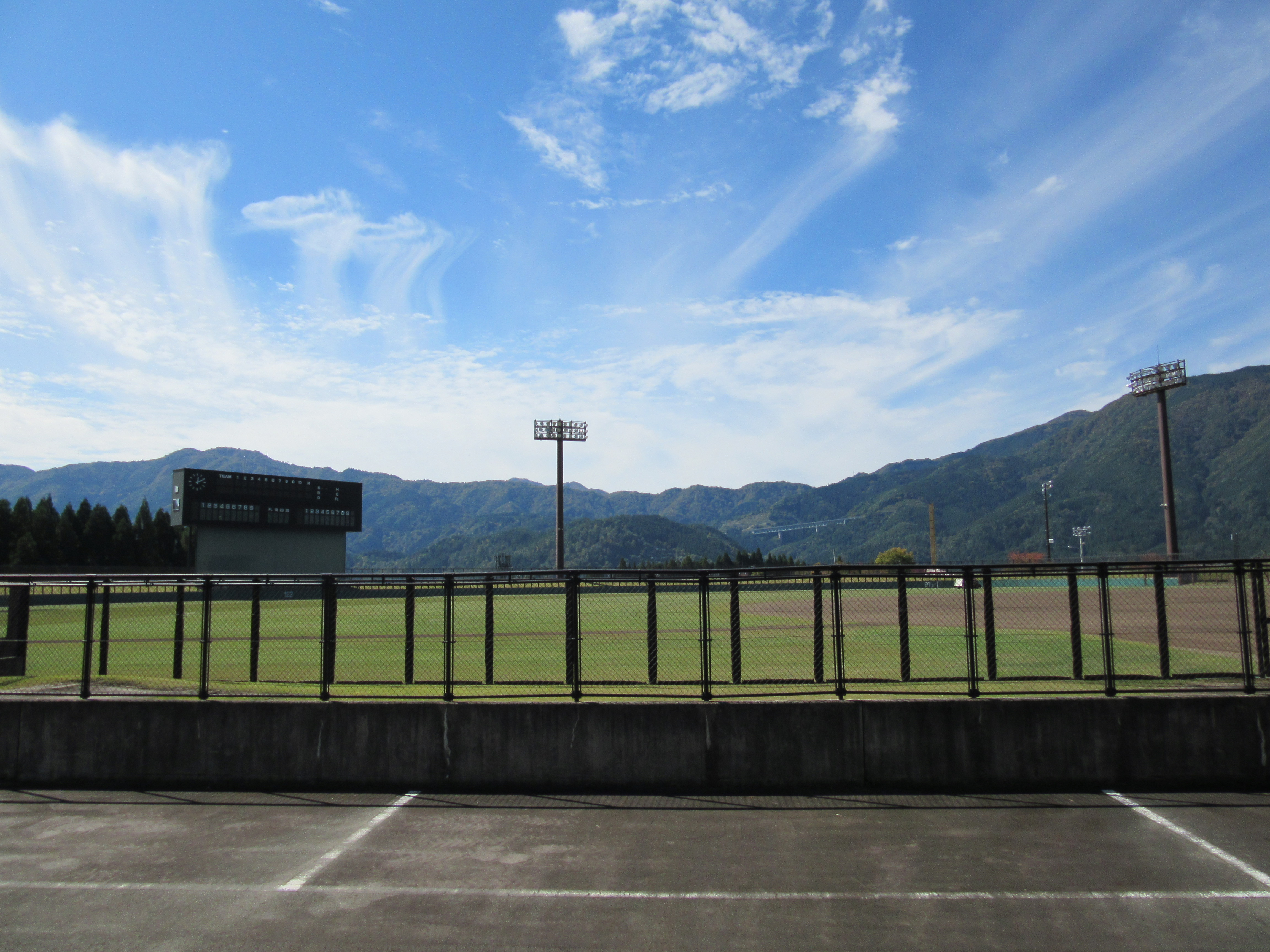 郡上市合併記念公園市民球場